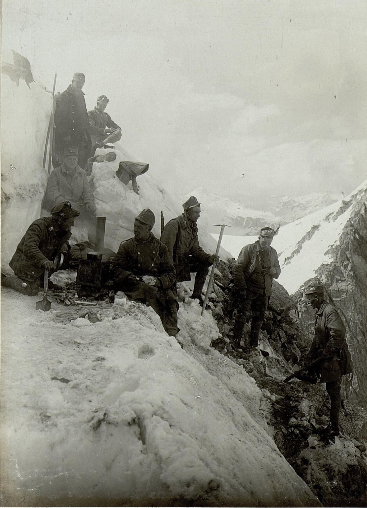 Alpine Besatzung auf Cima di Cavento